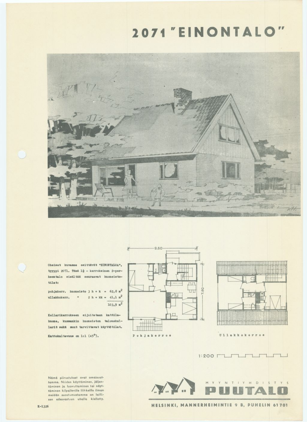 Myyntiyhdistys Puutalo: malli Eino, 1959. Esittelylehtinen